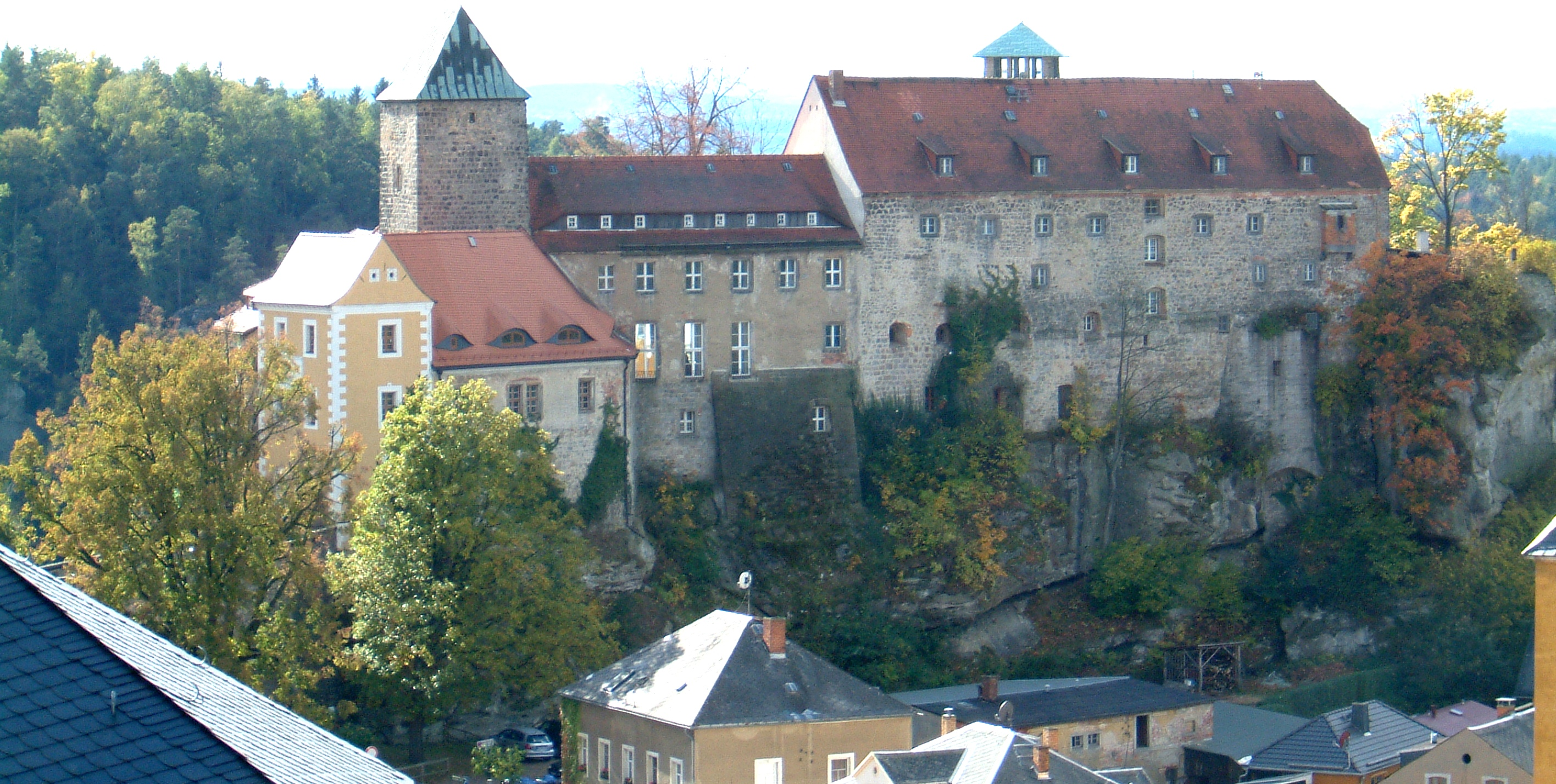 Hohnstein